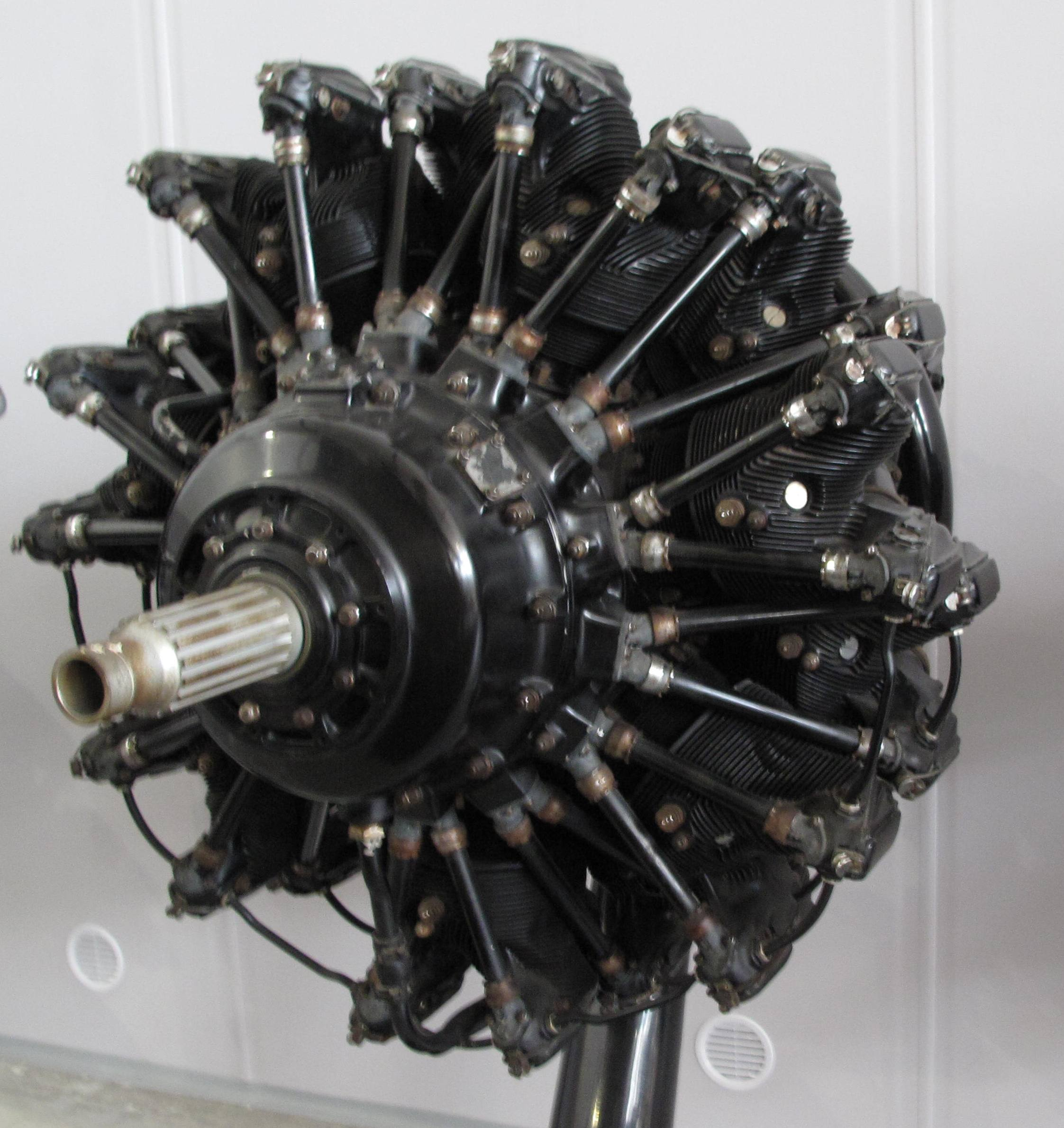 Letecké muzeum Kbely